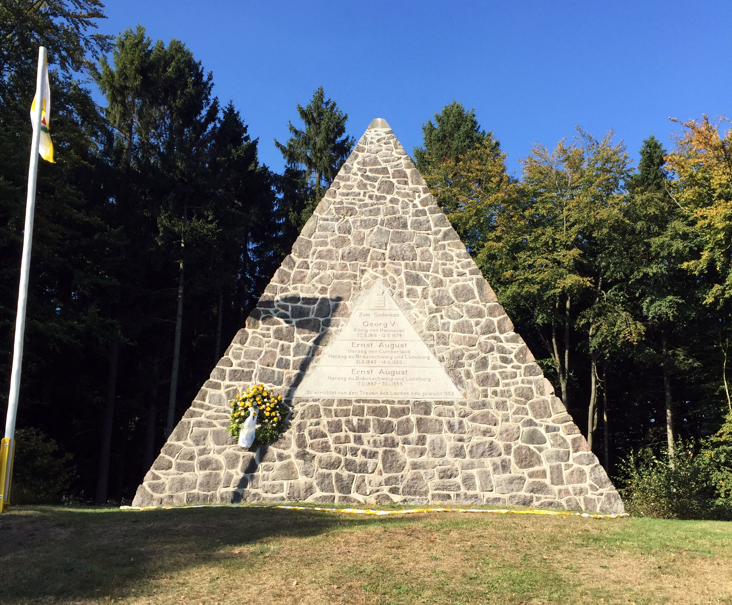 Fürstendenkmal von 1911 zum Gedenken an Georg V.